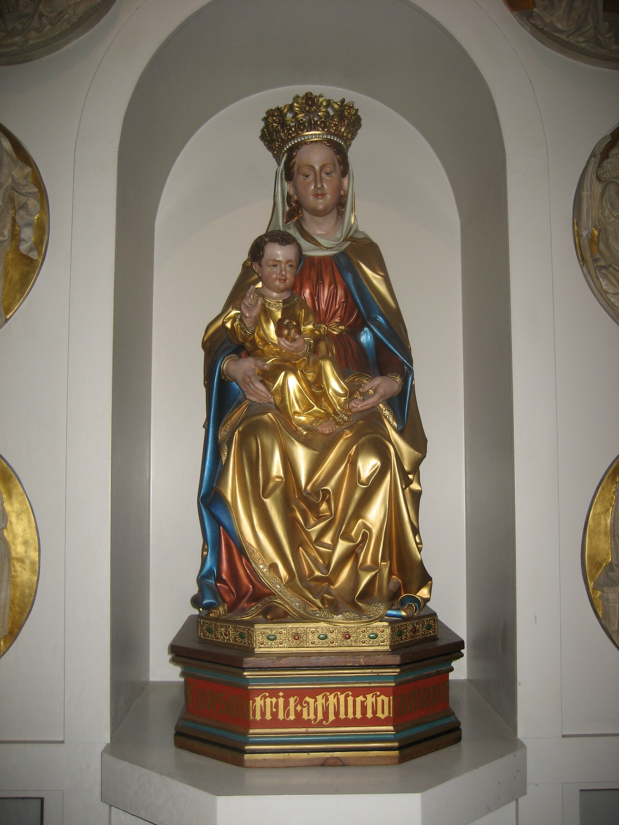 Mariakapel, Catharinakerk, Lange Nieuwstraat, Utrecht (Nederland)